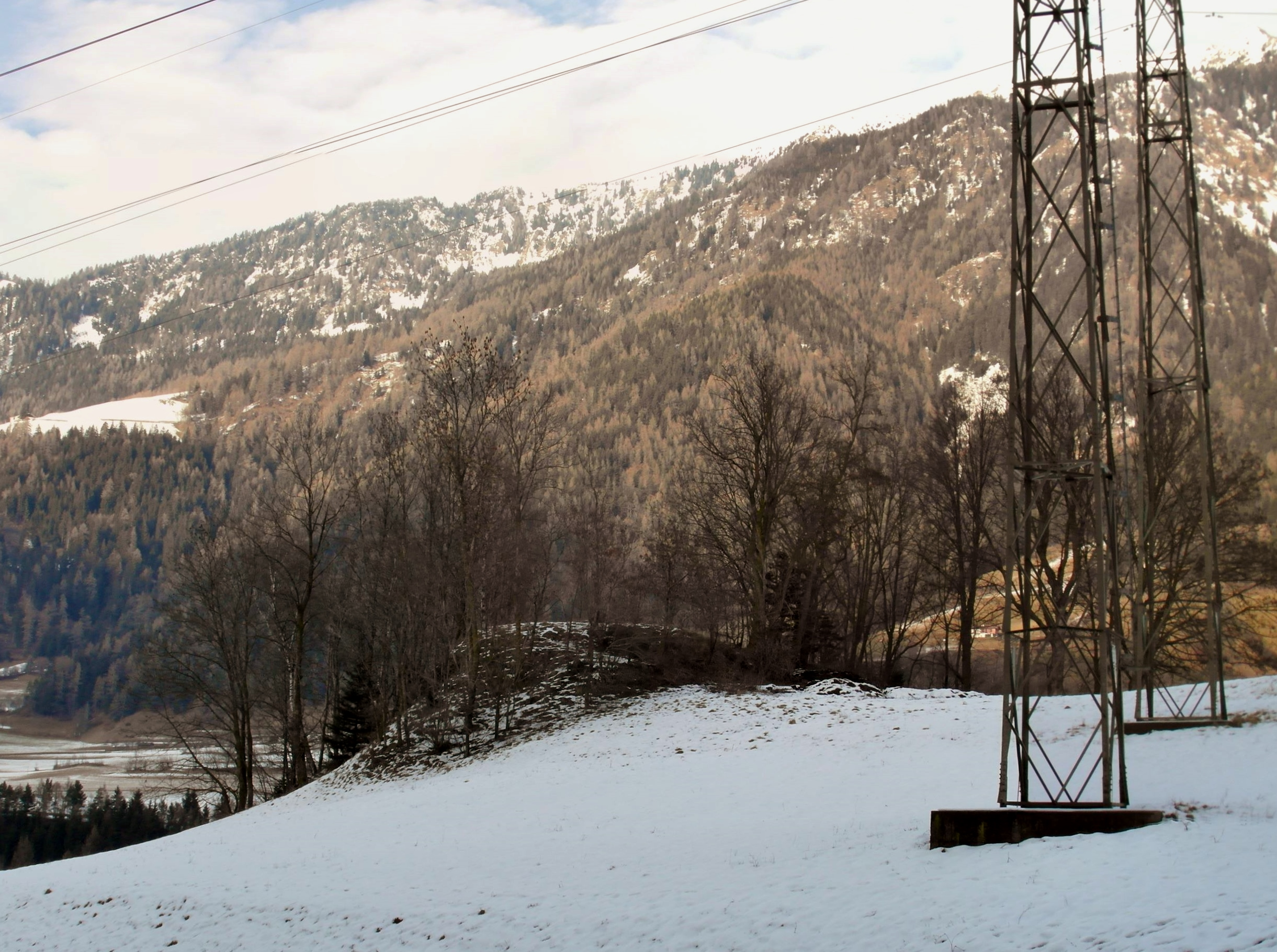 Opera 9 Mules